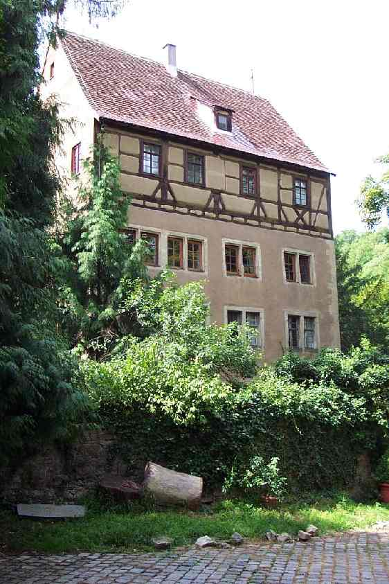 Das 1593 unter der Leitung des herzoglichen Baumeisters Heinrich Schickhardt errichtete Torhaus des Schlosses Hochberg